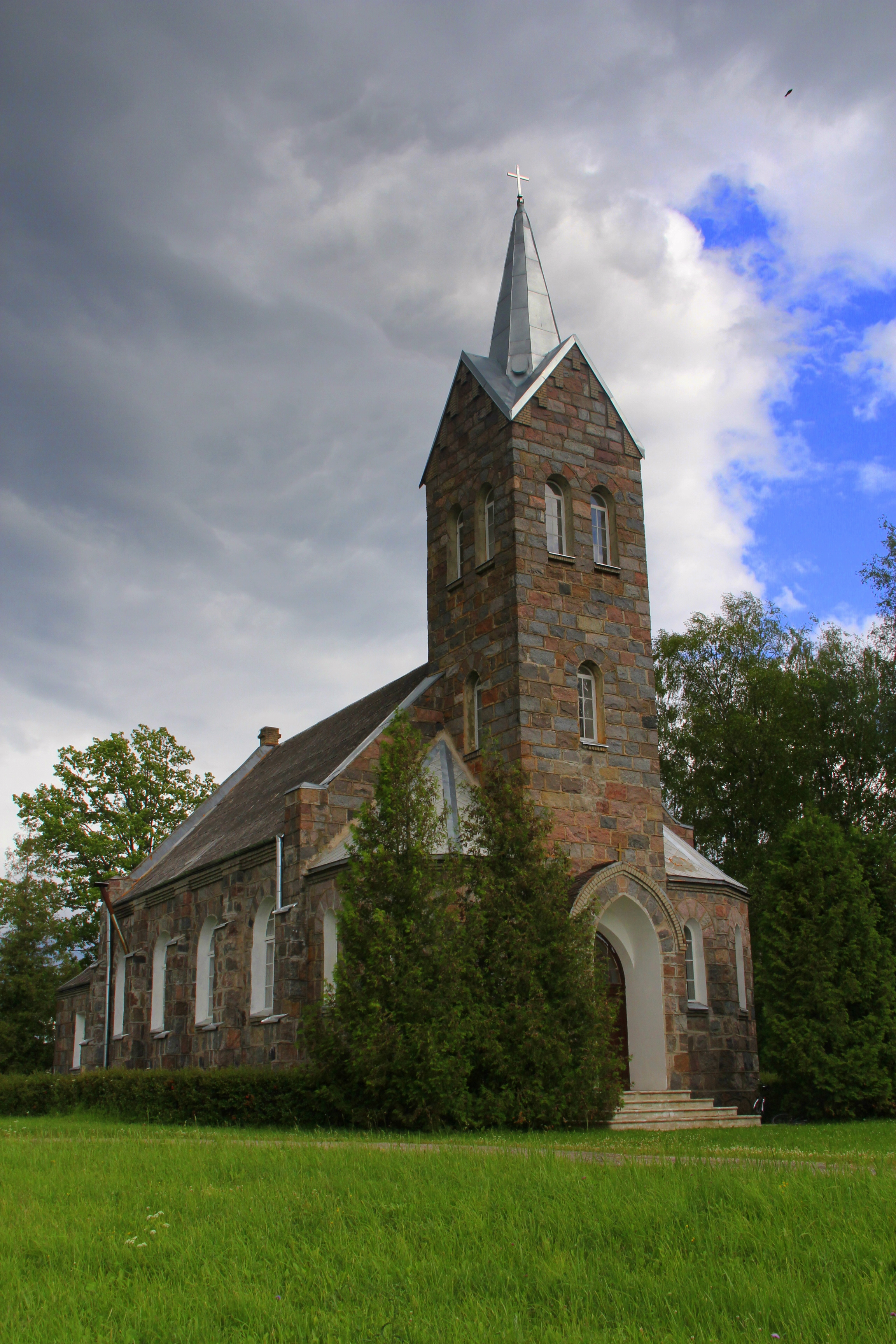 Liepnas luterāņu baznīca, Liepna